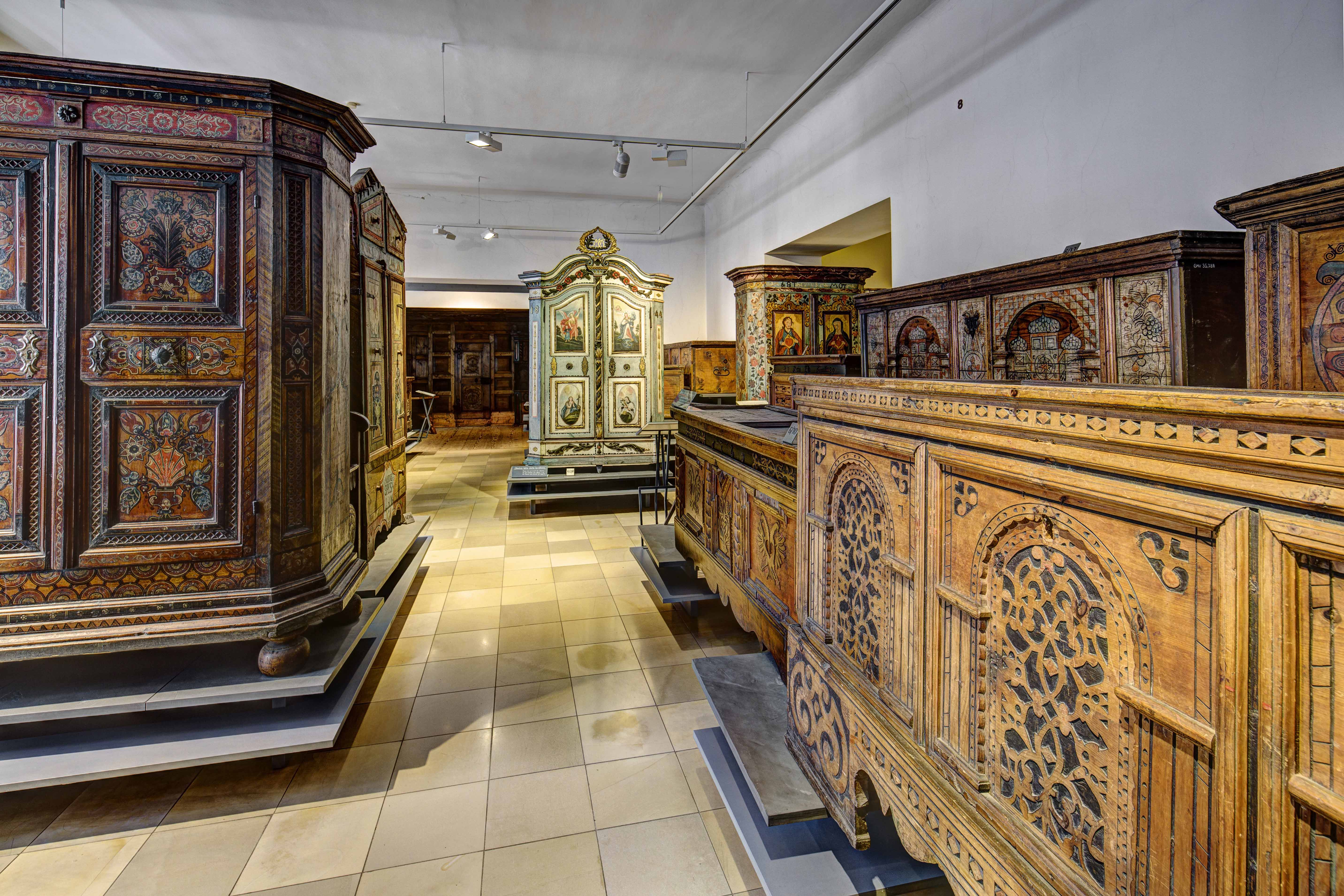 Volkskundemuseum Wien